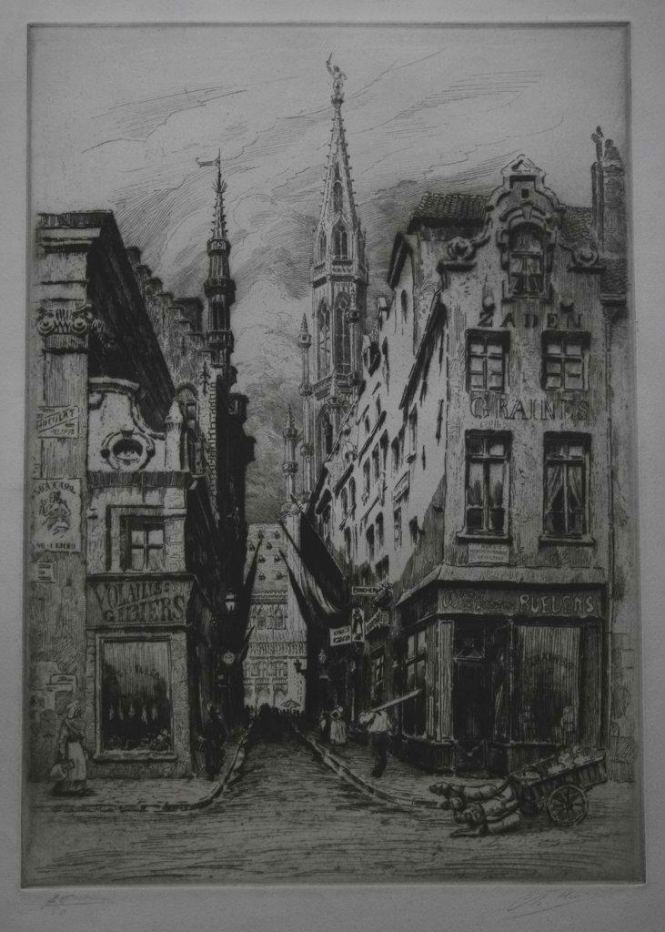 Bruxelles, Rue Chair et Pain - gravure de Charles Pinet (grand format) (basse définition)